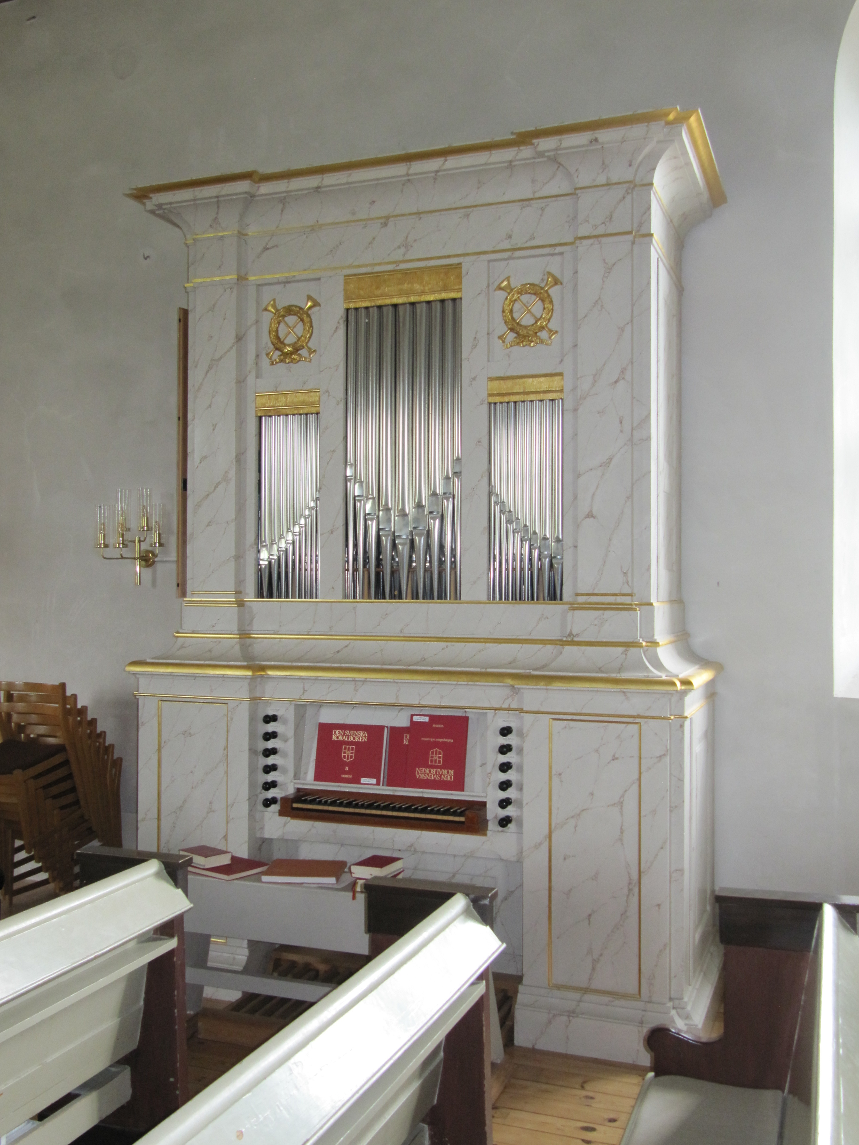 Kororgel i Kisa kyrka